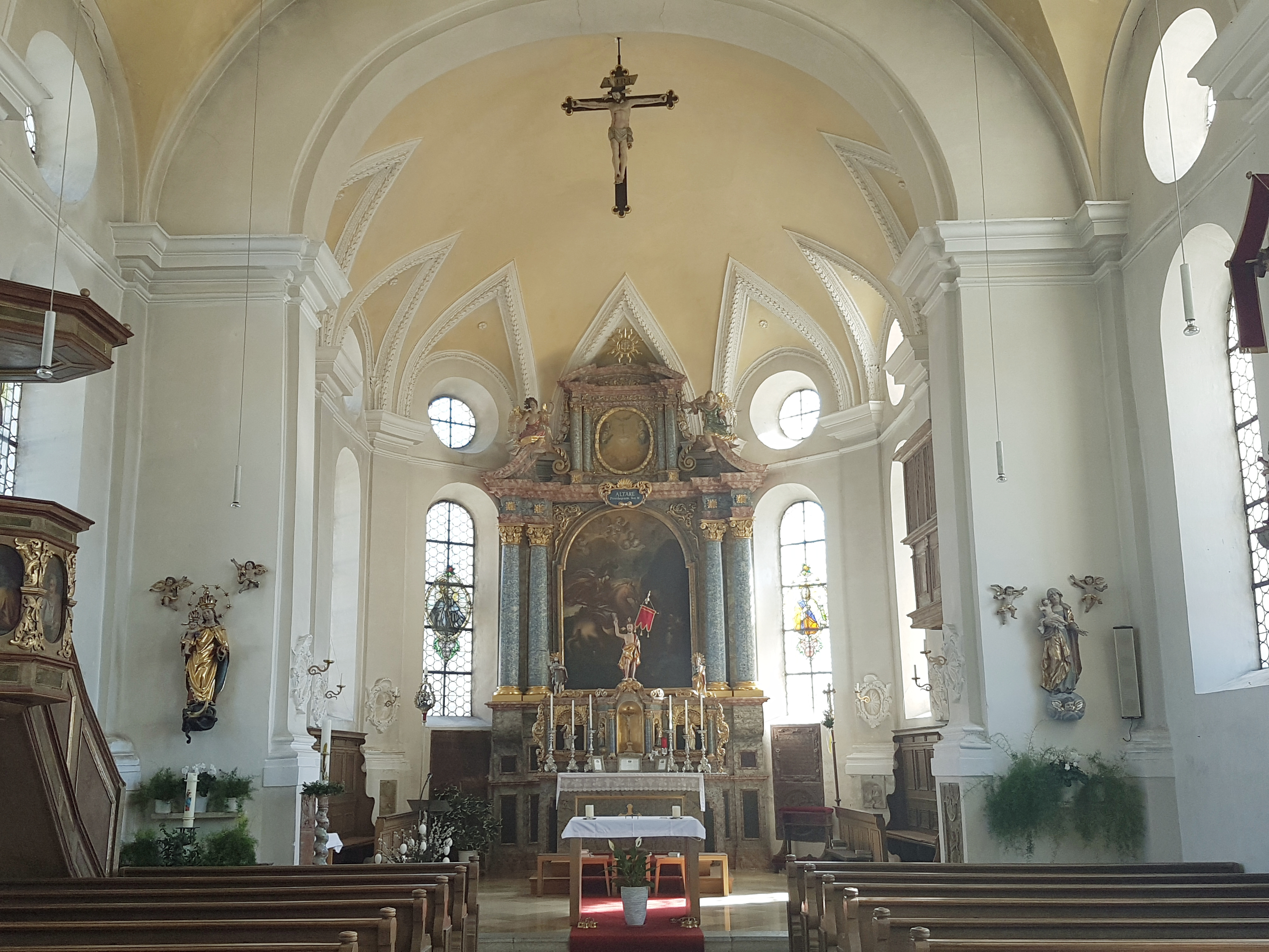 St. Georg (Pöring), Innenraum mit Blick zum Chor